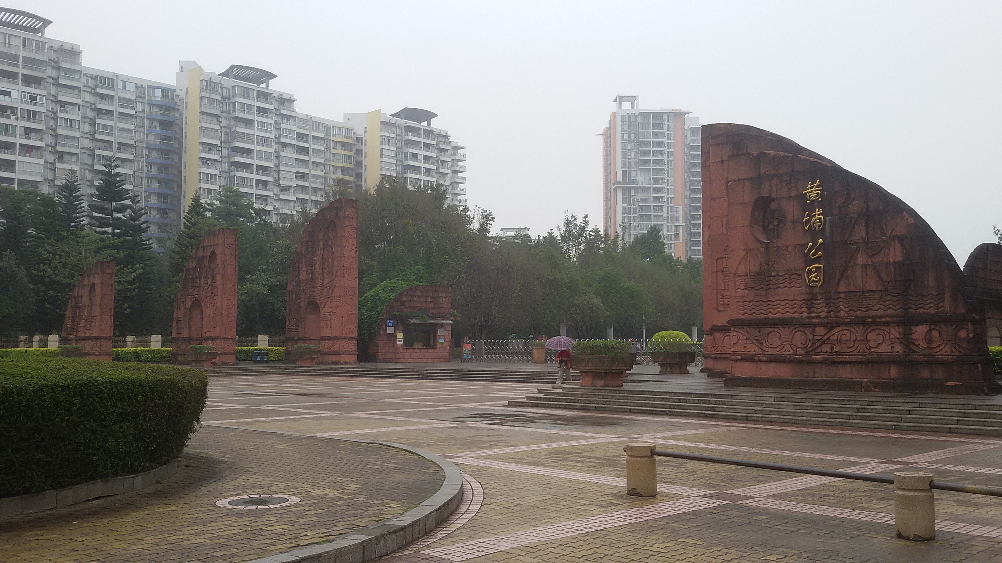 粵語: 广州黄埔公园嘅正门